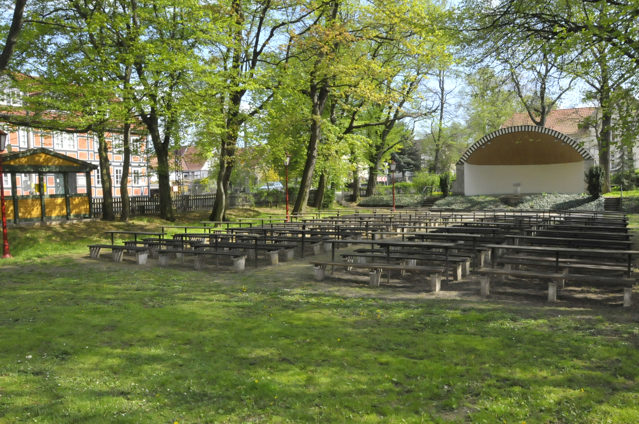 Mülverstedt, Veranstaltungsplatz